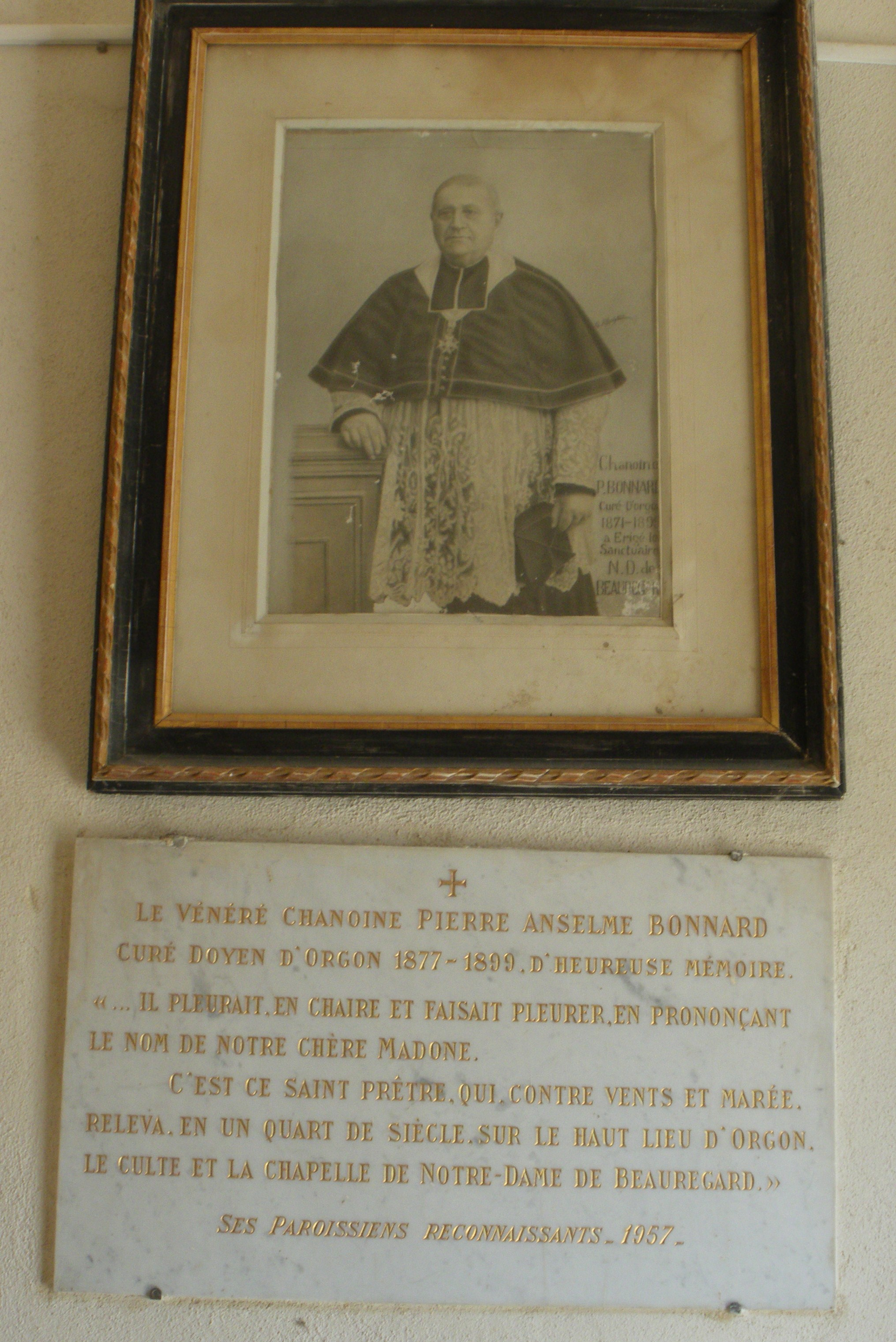 Plaque hommage au chanoine Bonnard, à l'église Notre Dame de Beauregard d'Orgon (13)